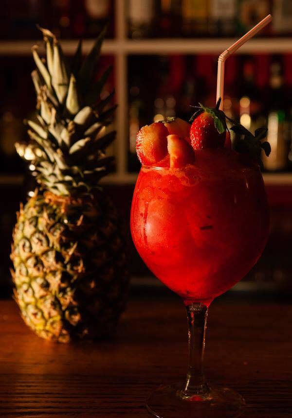 Daiquirí de fresa, por el Rey del Mojito. Raimon Social Club